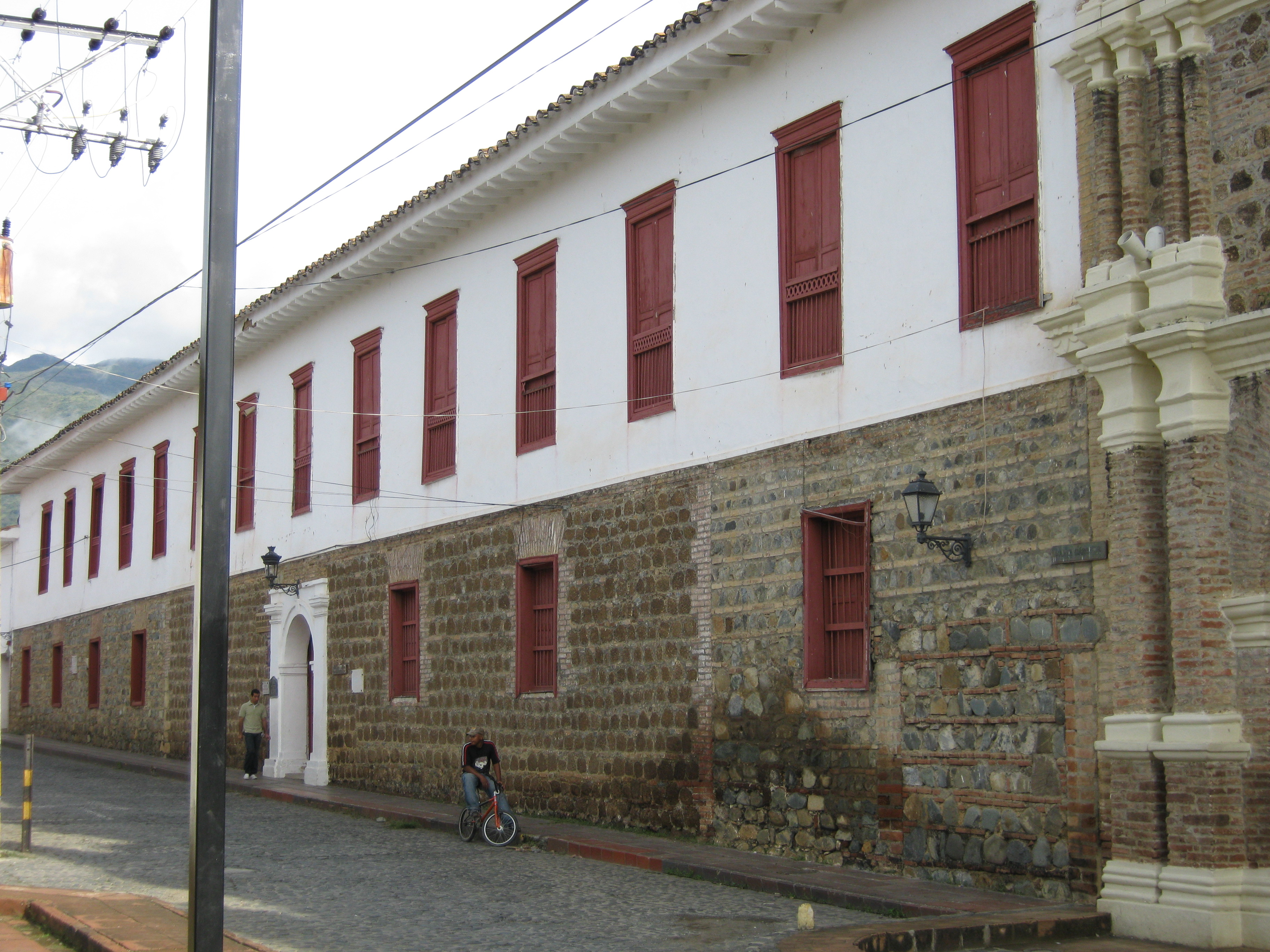 Museo de Arte Religioso de Santa Fe de Antioquia — en Santa Fe de Antioquia, Colombia.